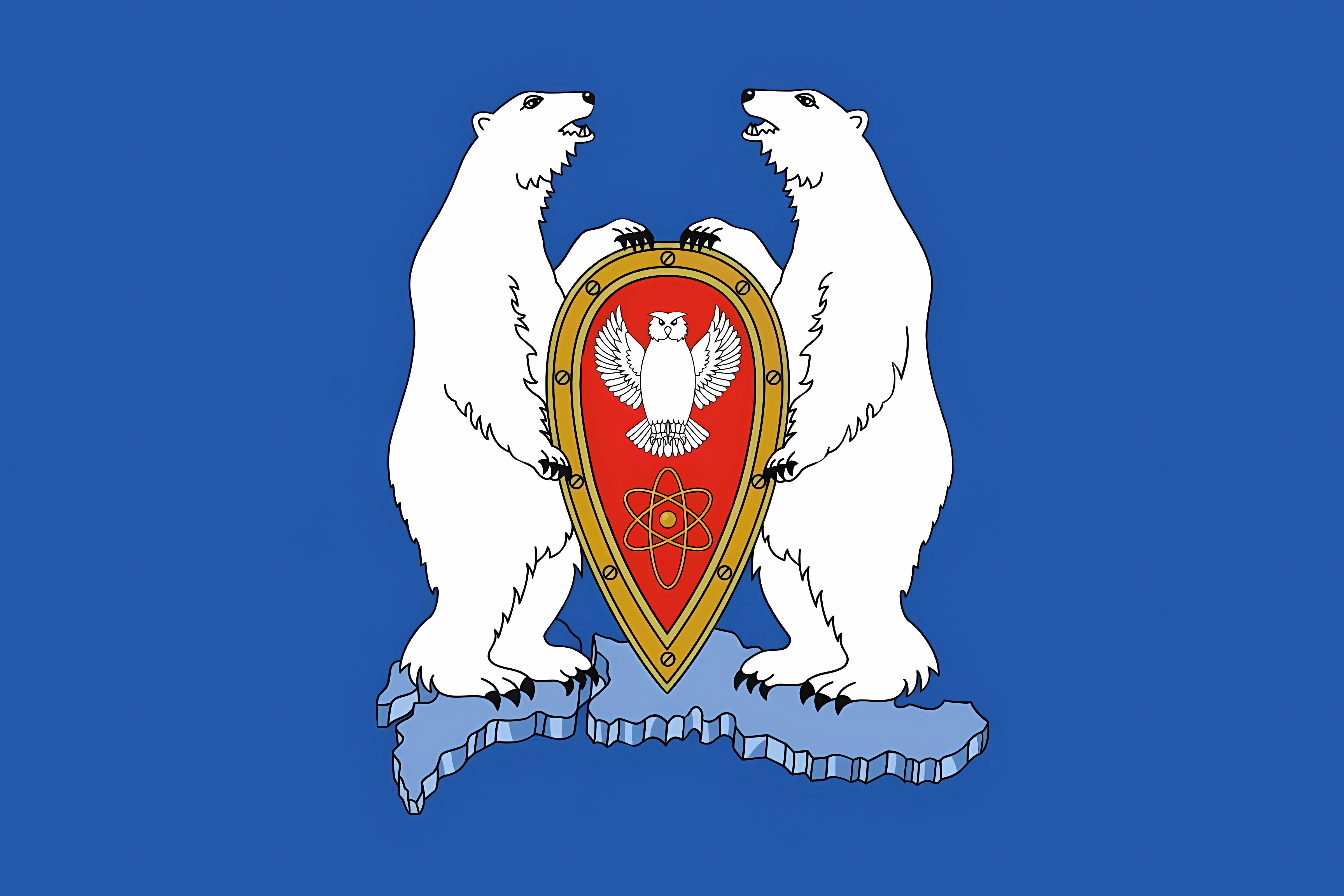 Флаг муниципального образования «Новая Земля».